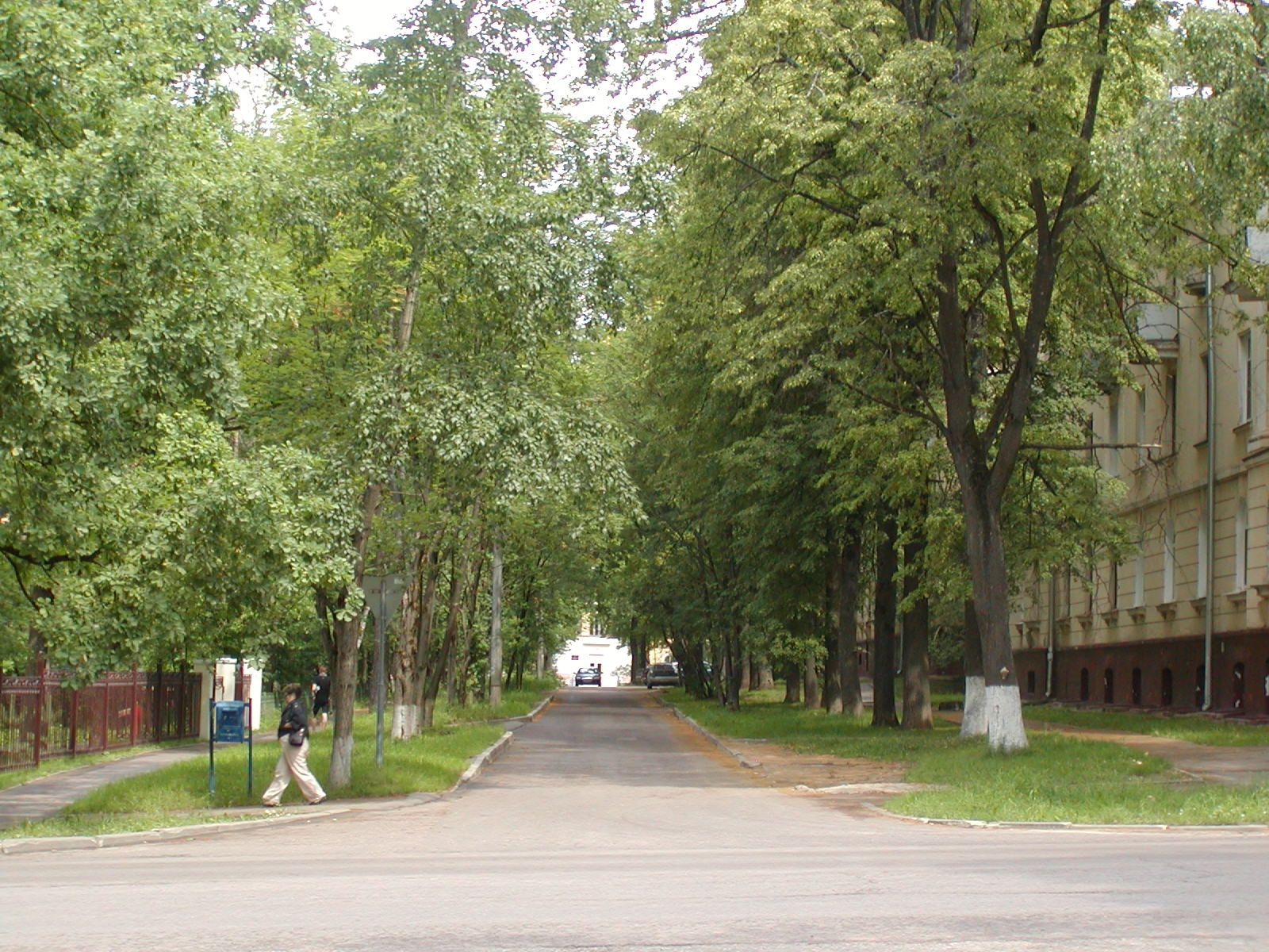 Общий вид улицы Мигунова в Обнинске от начала улицы на школу № 1.